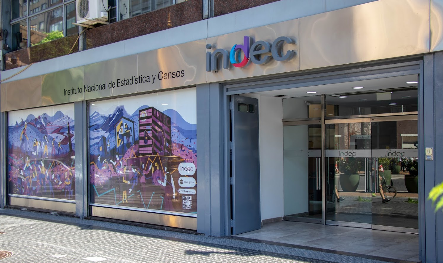 El Instituto Nacional de Estadística y Censos (INDEC) es un organismo público desconcentrado de carácter técnico, dentro de la órbita del Ministerio de Hacienda de la Nación, que ejerce la dirección superior de todas las actividades estadísticas oficiales que se realizan en la República Argentina.